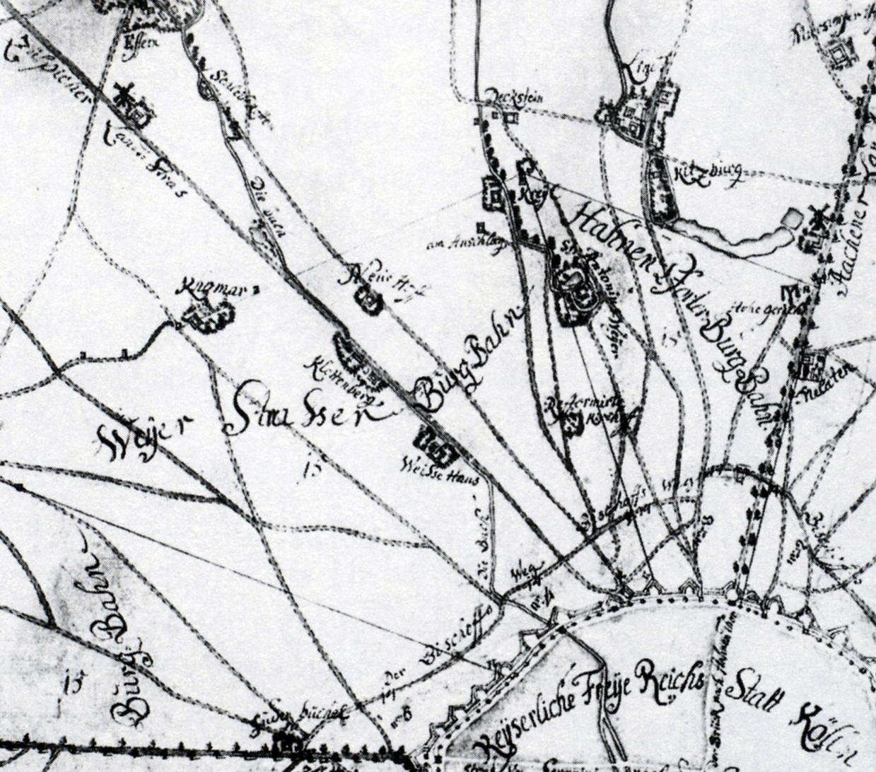 Köln im Mittelalter, nach dem Plan über den Kölner Schweid